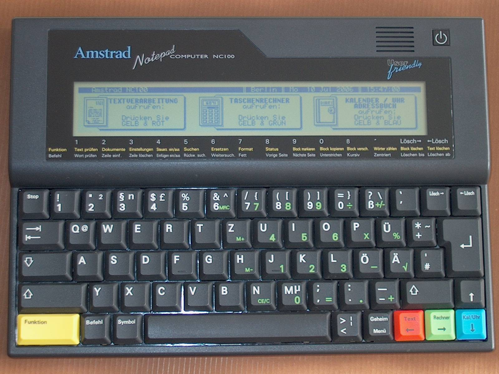 Bildbeschreibung: Amstrad NC100 Notepad-Computer Quelle: Selbst fotografiert Fotograf/Zeichner: Putput Datum: 2006-07-10 Sonstiges: ...